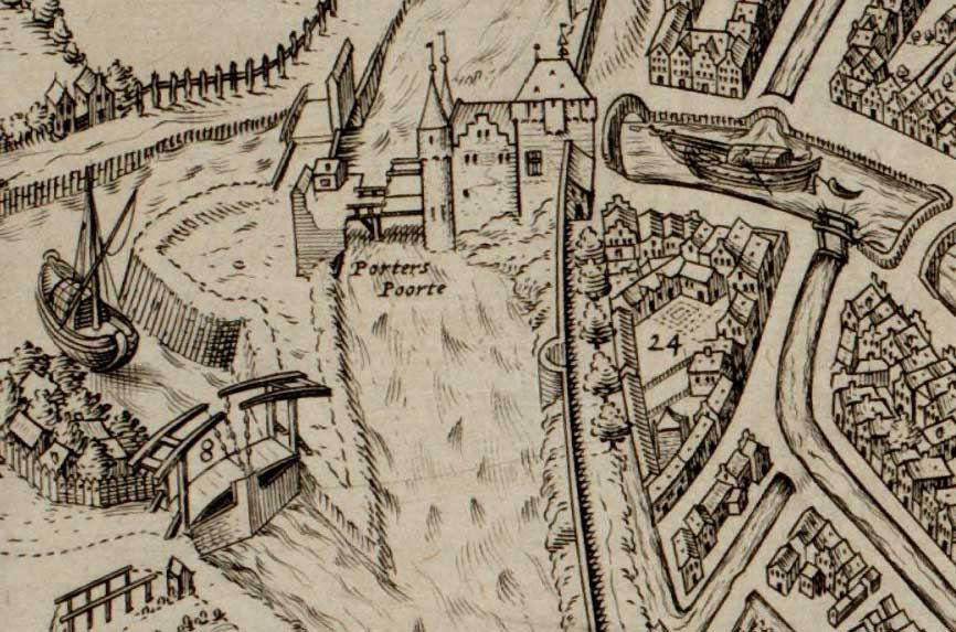 fragment van een kaart van Gouda door Braun & Hogenberg